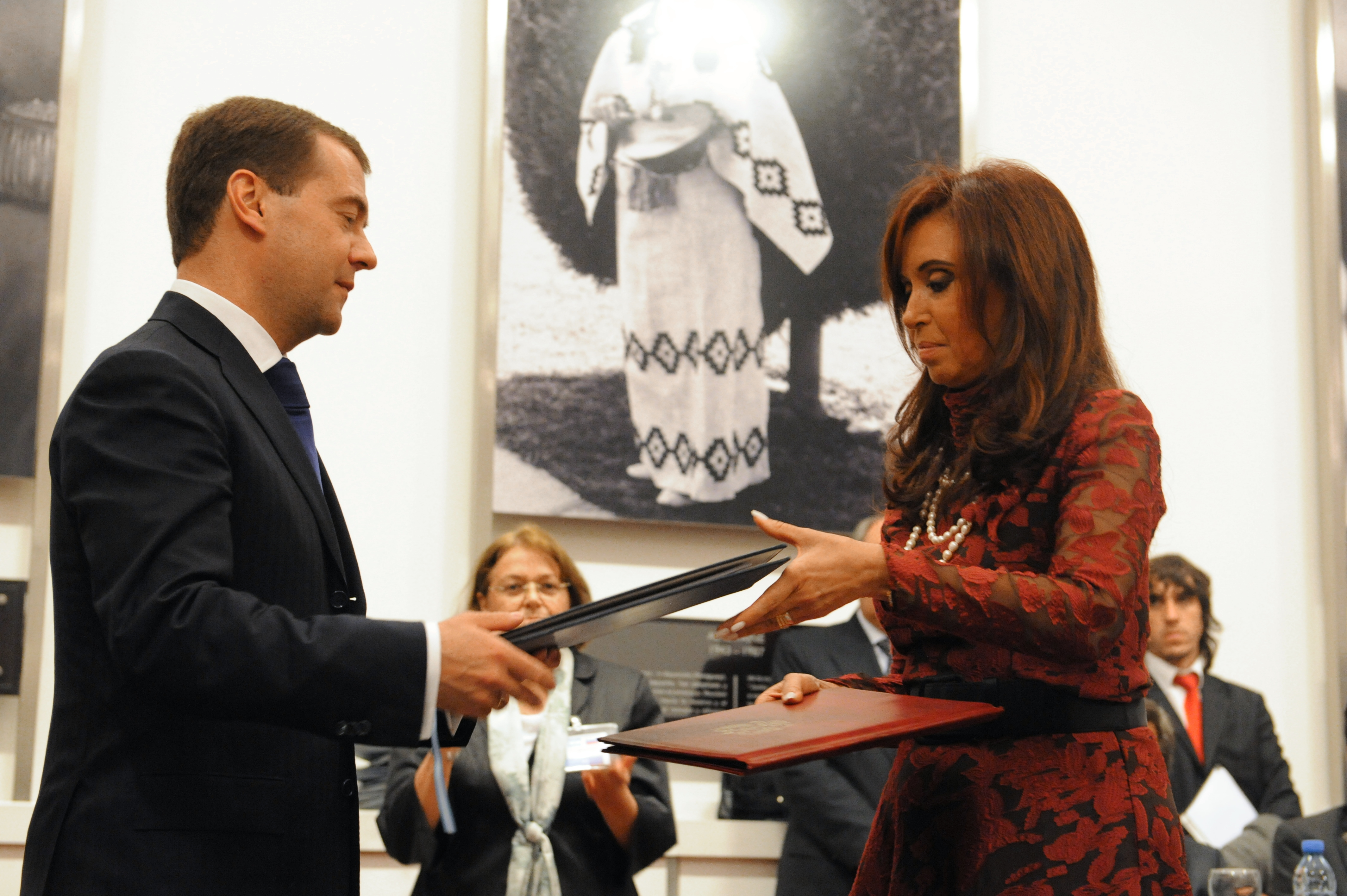 Reunión con el Presidente de la Federación Rusa en Casa Rosada